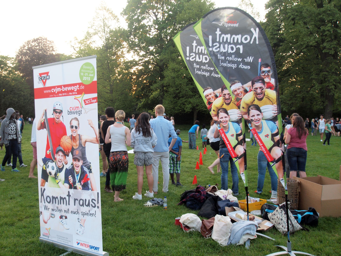 CVJM beim Christival Kommt raus! Wir wollen mit euch spielen!